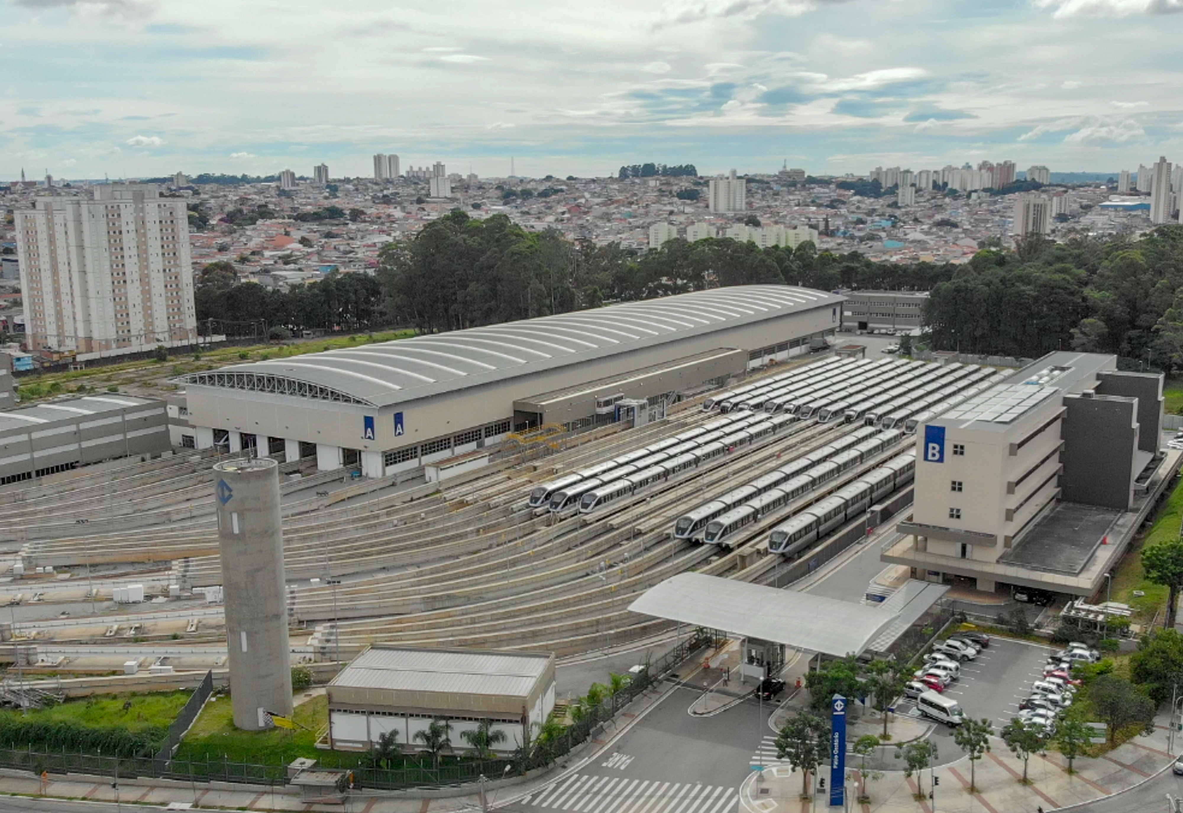 Viagem de Inspeção no trecho Oratório-São Mateus, Linha 15-Prata do Metrô (Monotrilho). Local: São Paulo/SP. Data: 20/02/2018 Foto: Governo do Estado de São Paulo